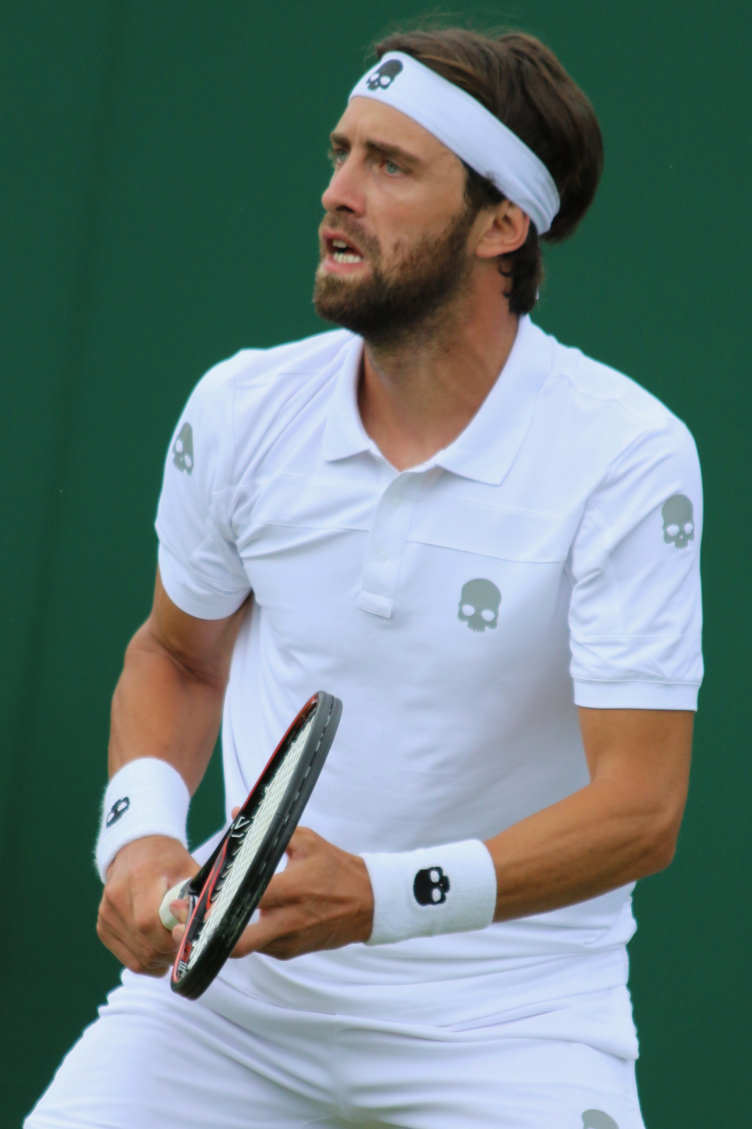 Basilashvili WM17 (1)